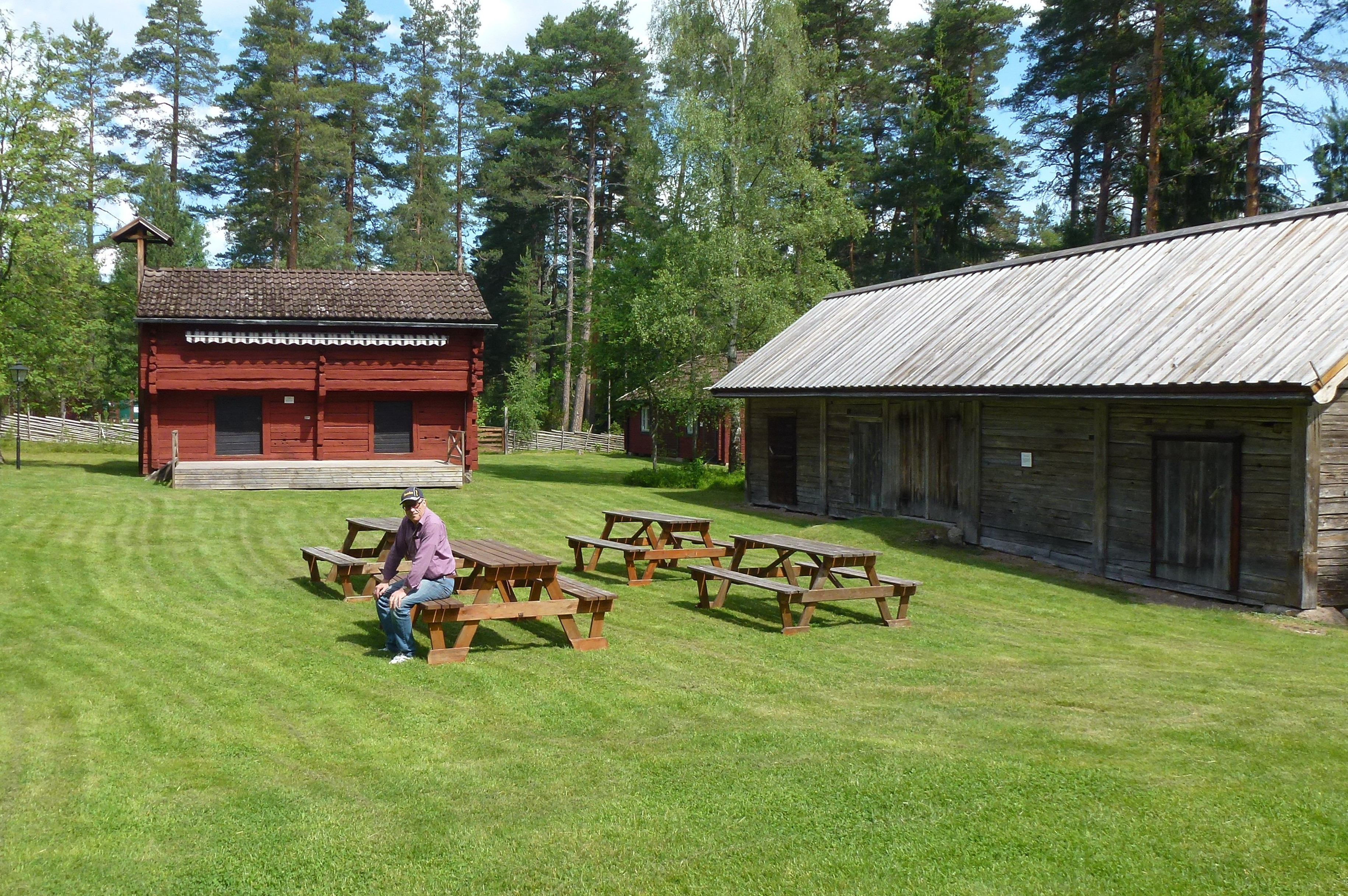 Rumskulla hembygdsgård